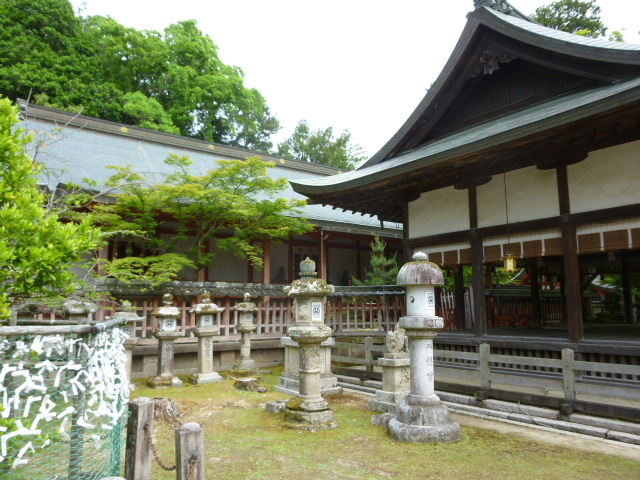 手向け山八幡宮本殿